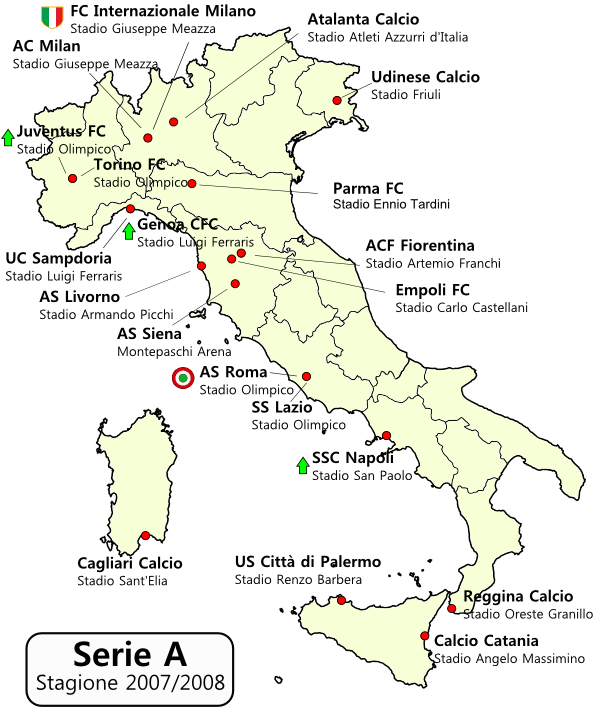 Distribuzione geografica squadre Serie A 2007-2008